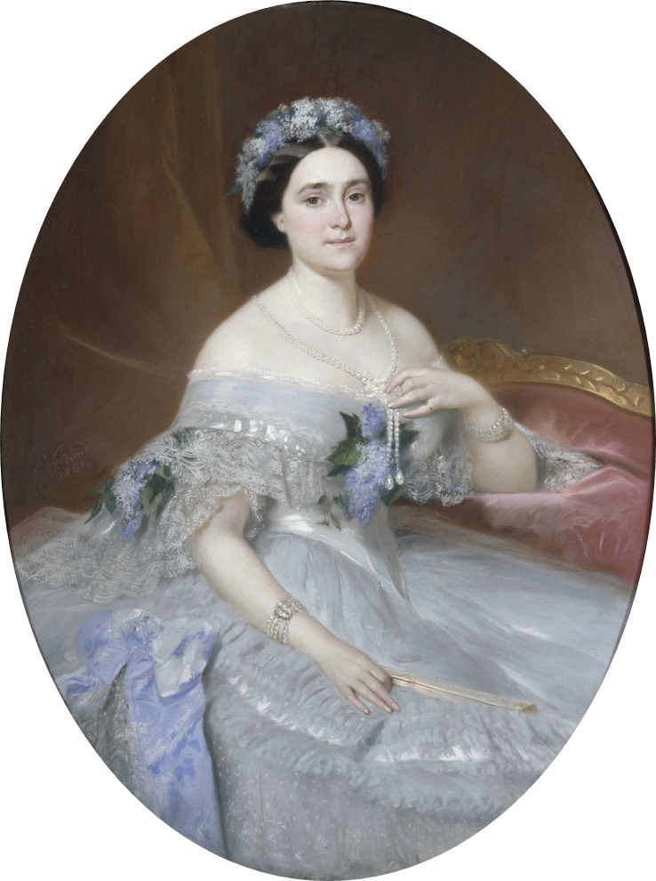 Portrait de la princesse Mathilde Napoléon